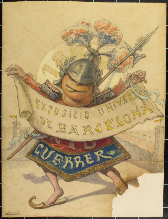 Guerrer, Llapis i aquarella sobre paper, Barcelona.